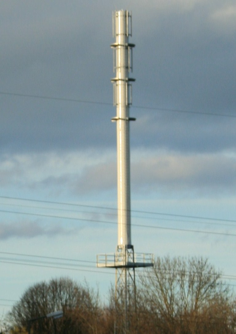 Der neue freistehende Sendeturm am Freisinger Waldfriedhof